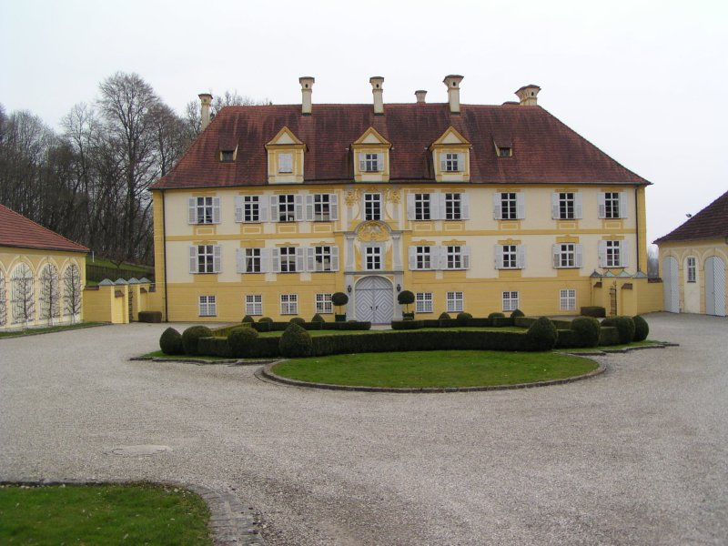 Dieses Bild zeigt die Vorderseite des Schlosses.